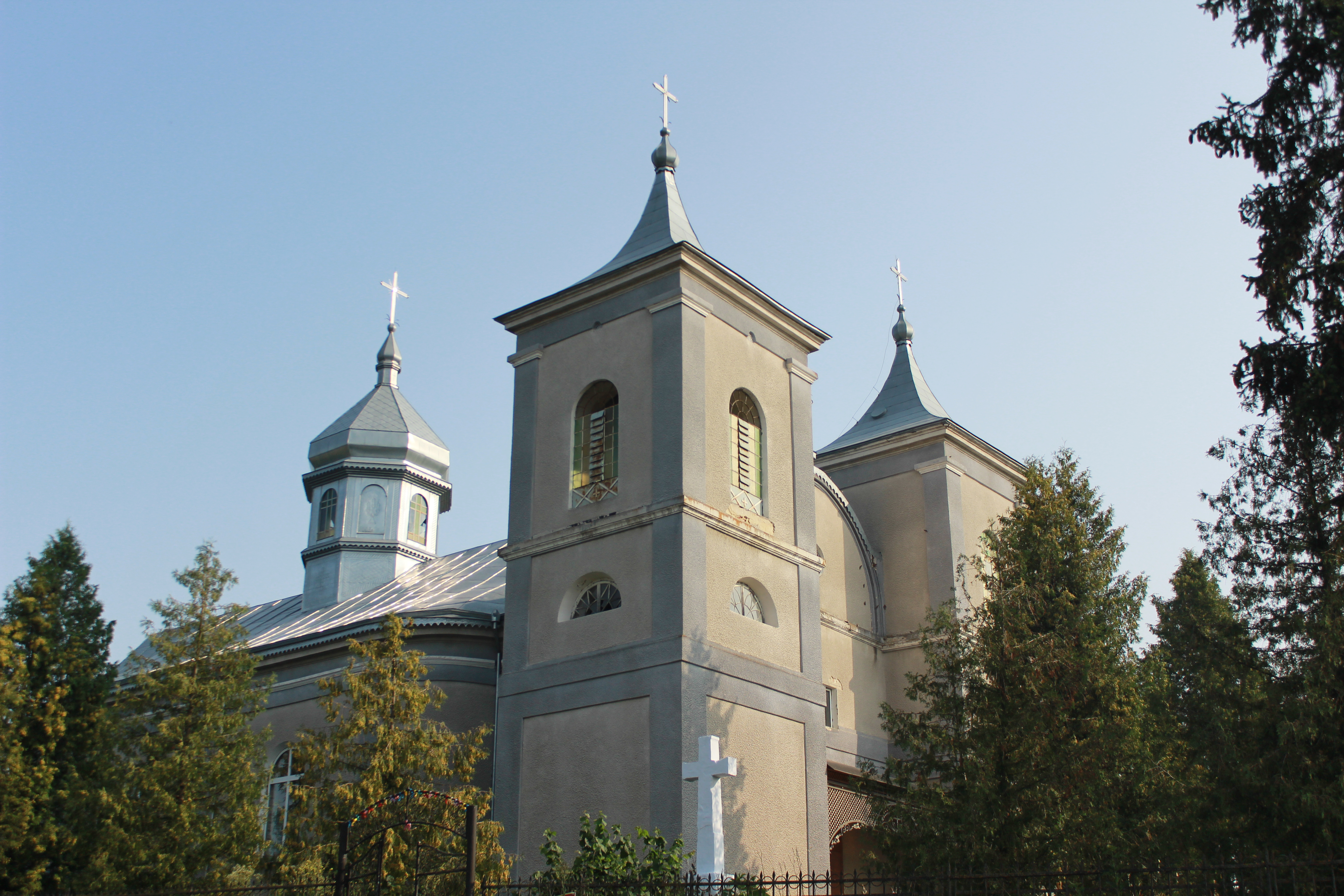 Цервка Благовіщення, с. Троське, Заліщицький район, Тернопільська область